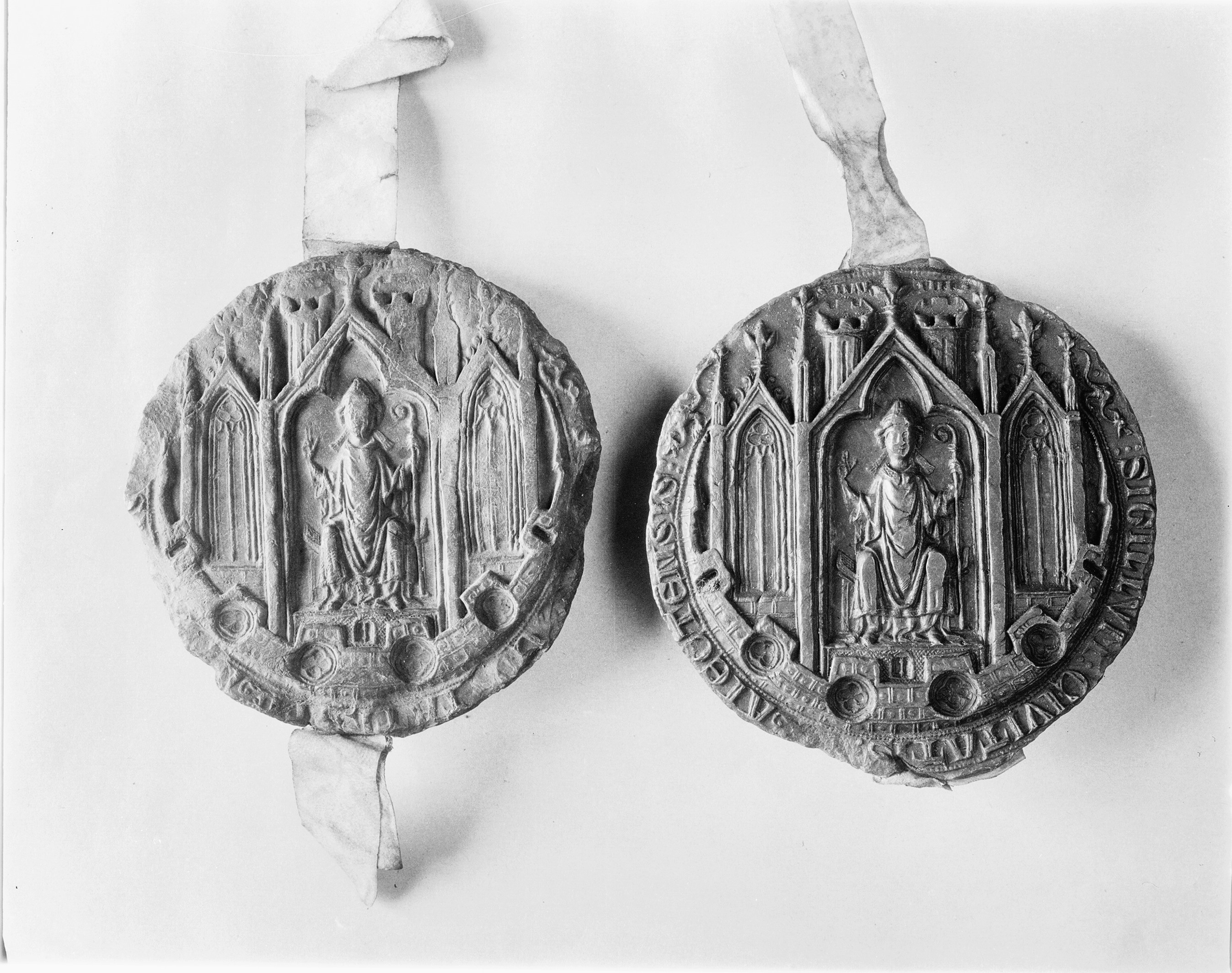 Een na oudste bekende stadszegel van de stad Utrecht. Prominent op een zetel in een kerk zit een geestelijke. Dat is Sint Maarten, beschermheilige van de stad of bisschop Jan van Nassau. Als randversiering is een ommuring aangebracht die veel prominenter aanwezig is in het oudst bekende stadszegel. Zegel uit ca. 1277 is in bezit van Centraal Gemeente Museum (Utrecht).